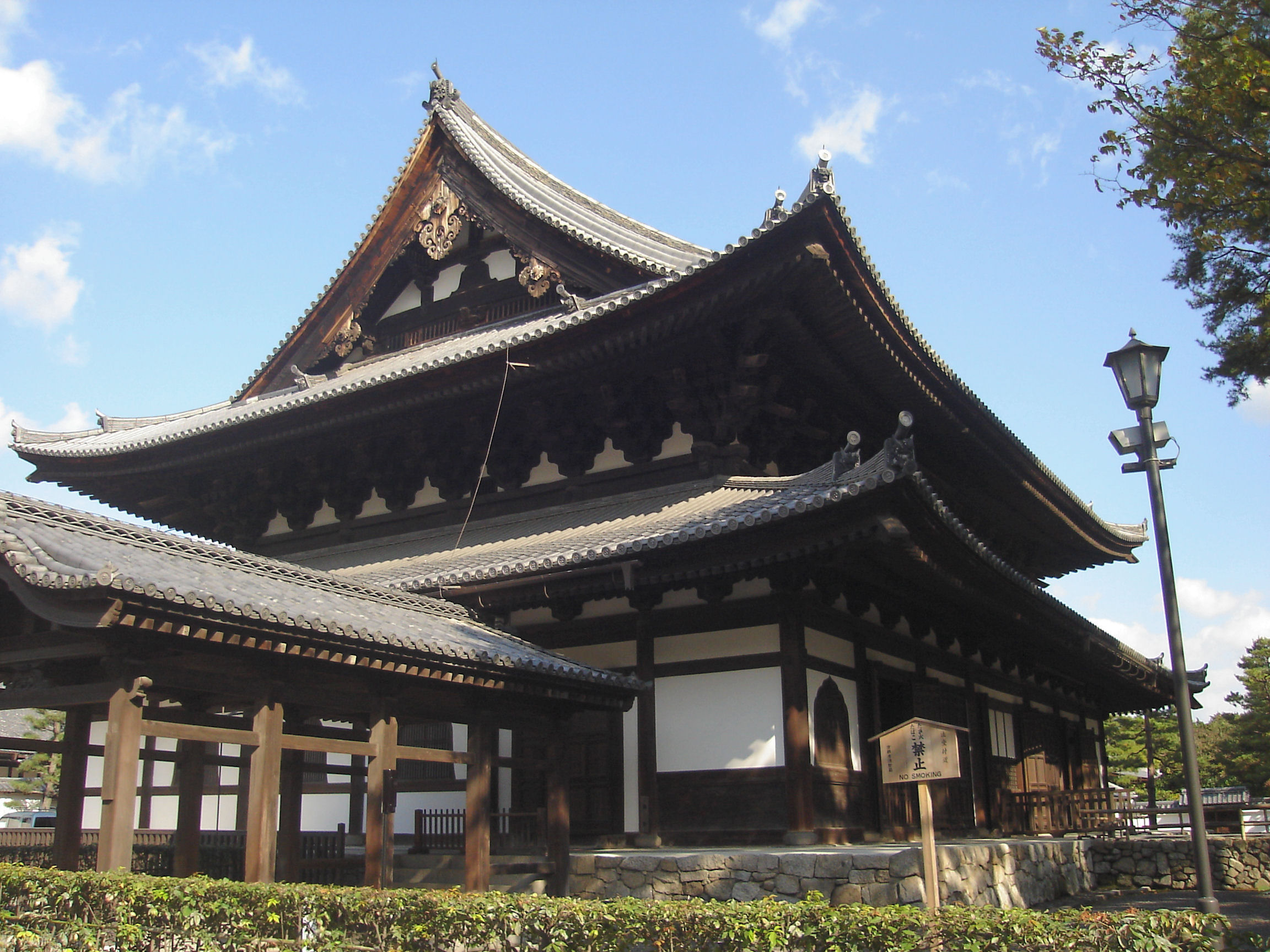 Syokokuji Hattou , kyoto japan